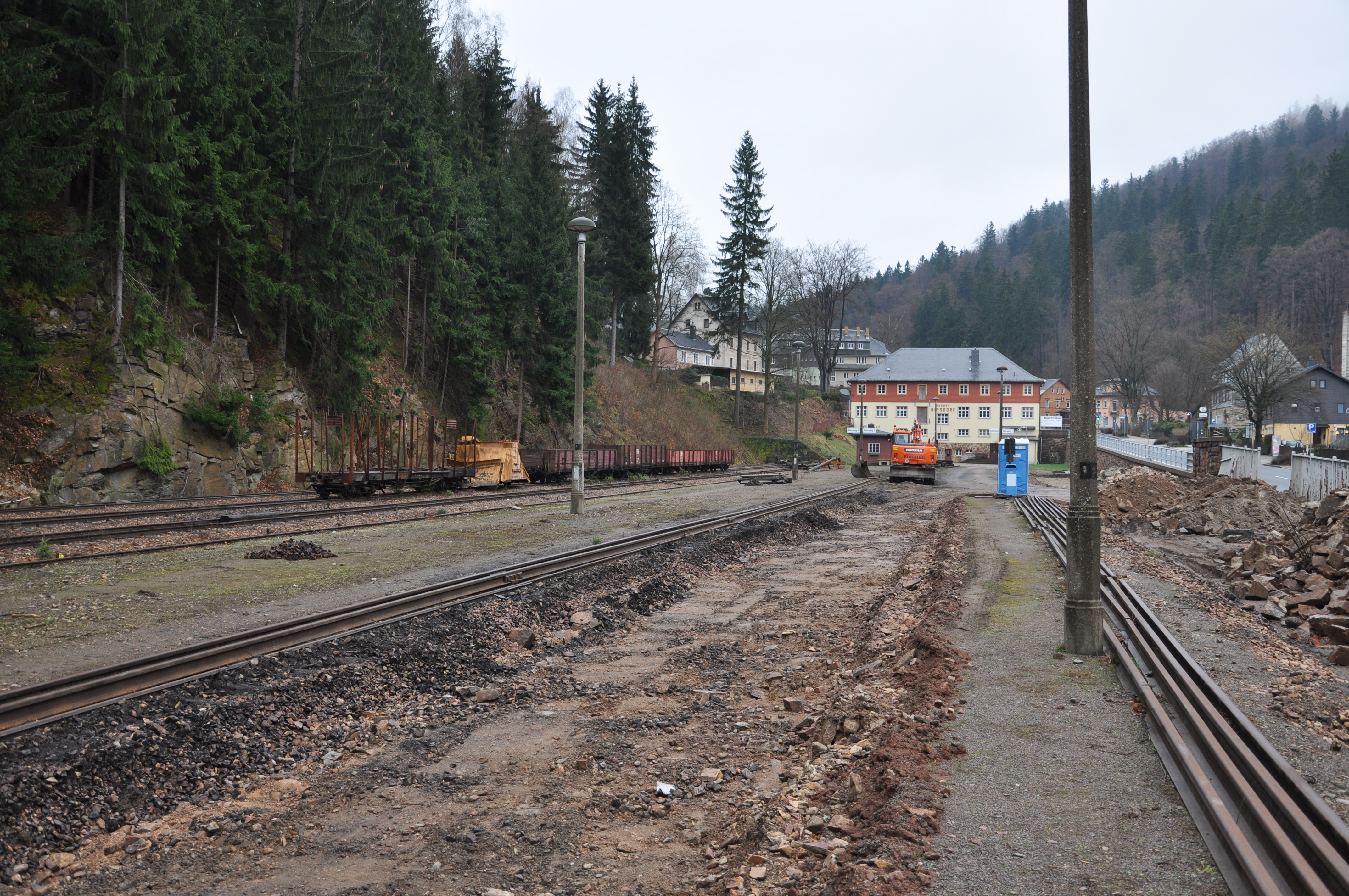 Bahnhof Kurort Kipsdorf, Gleisbauarbeiten